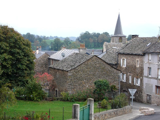 Le village de Prades de Salars